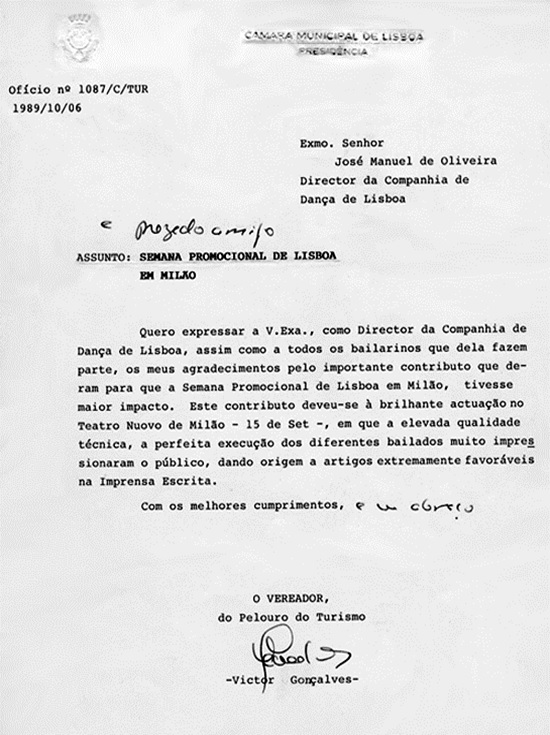 Victor Gonçalves expressa agradecimentos à companhia de dança